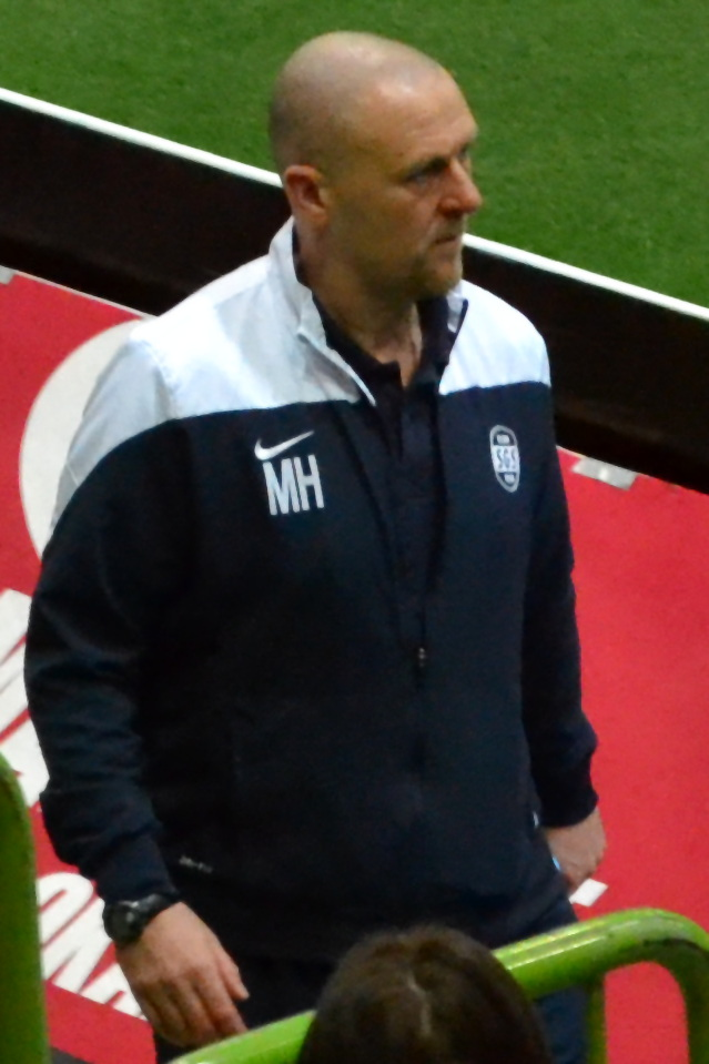 Markus Högner, Trainer der SGS Essen, beim SAP Frauen-FußballCup 2016